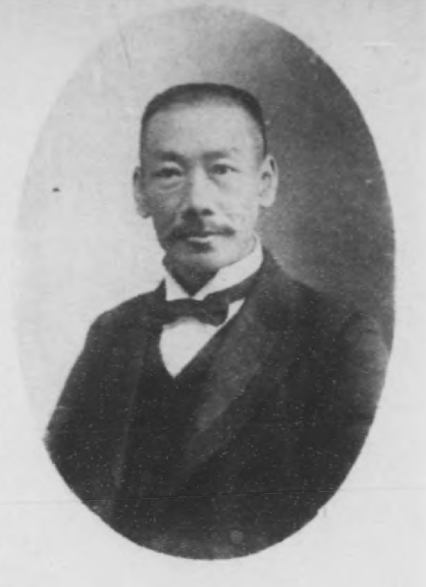 光緒三十年甲辰恩科貢士進士小像